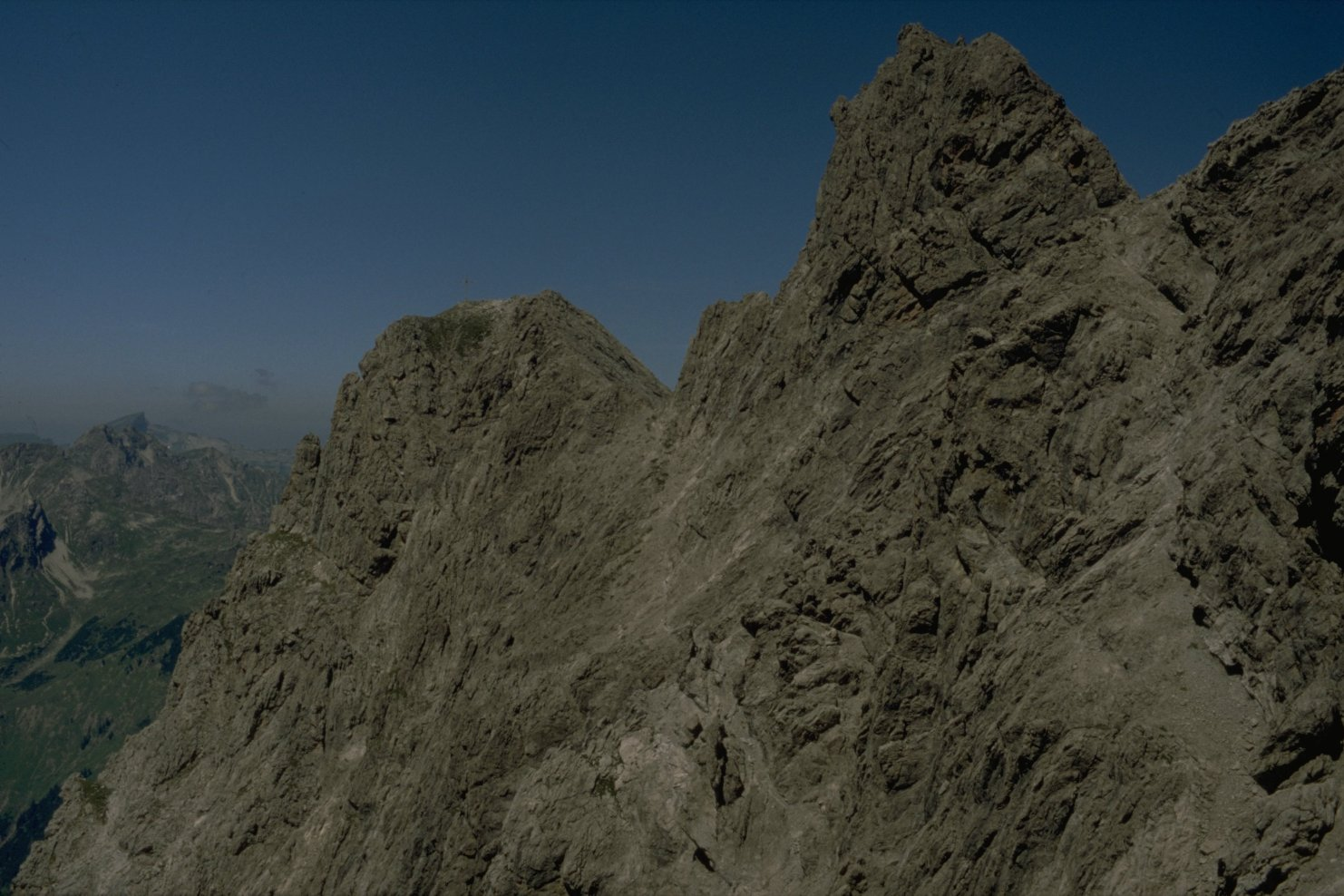 Berge der guten Hoffnung vom Weg zur Bockkarscharte